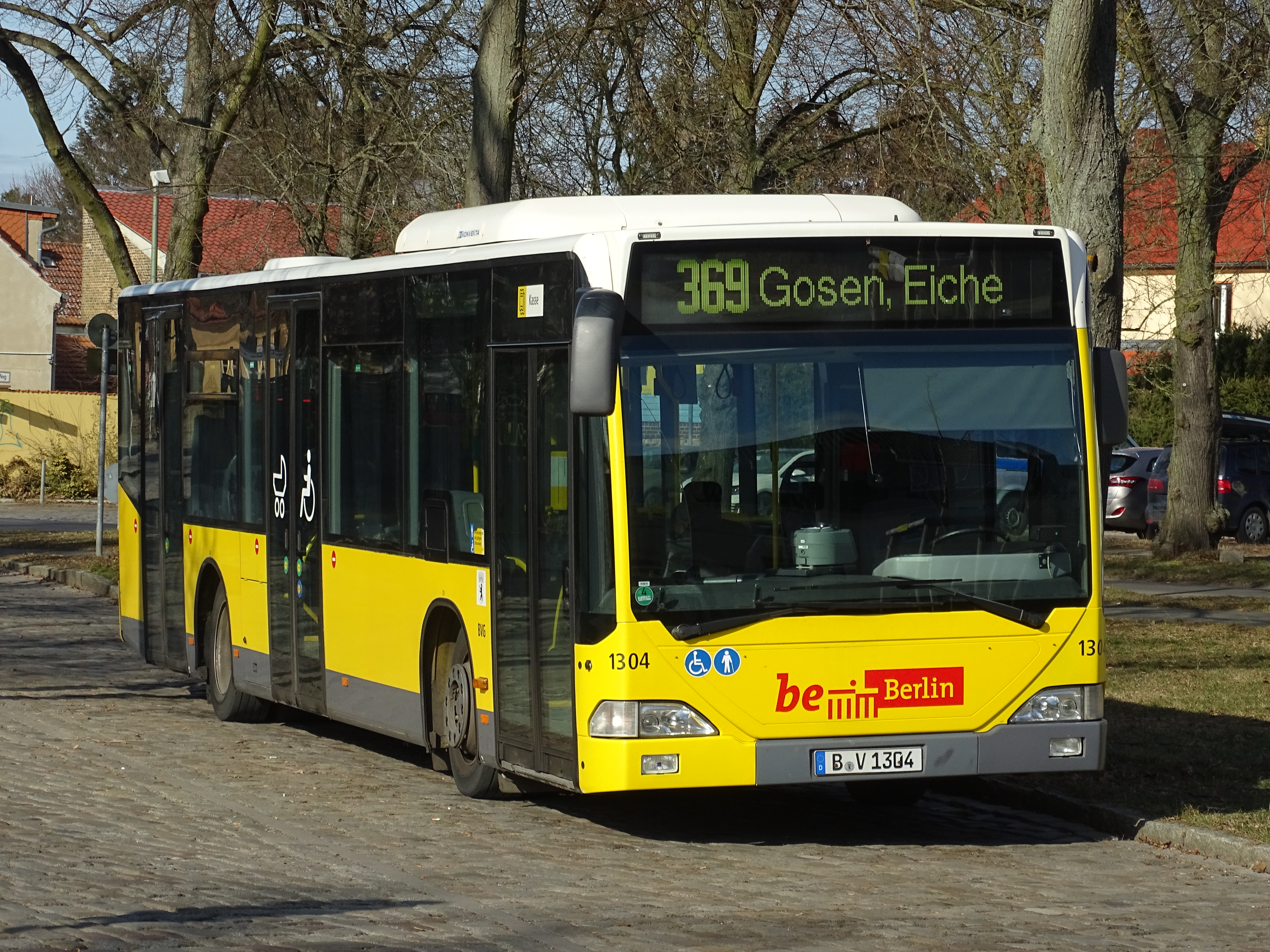 Bus der BVG Mercedes-Benz citaro O530 EN02